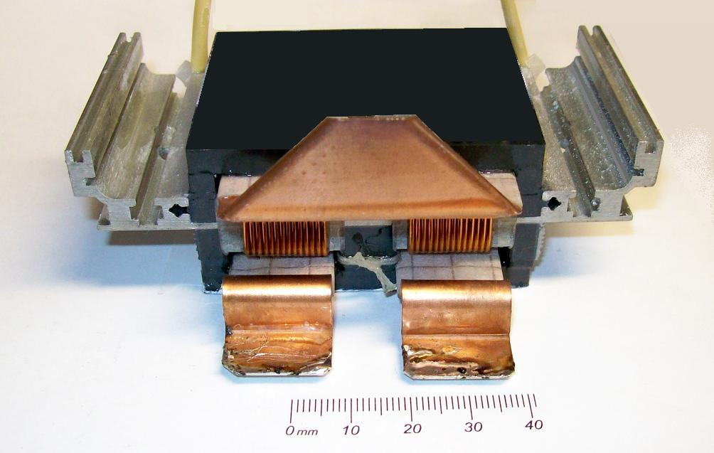 planar transformer mixed technology with wire-wound windings/ Planartrafo in gemischter Technologie Draht-/Bandwicklung, mit integriertem Kühlkörper, Übertragungsleistung 4 Kilowatt, Arbeitsfrequenz 145 kHz, Eigenentwicklung